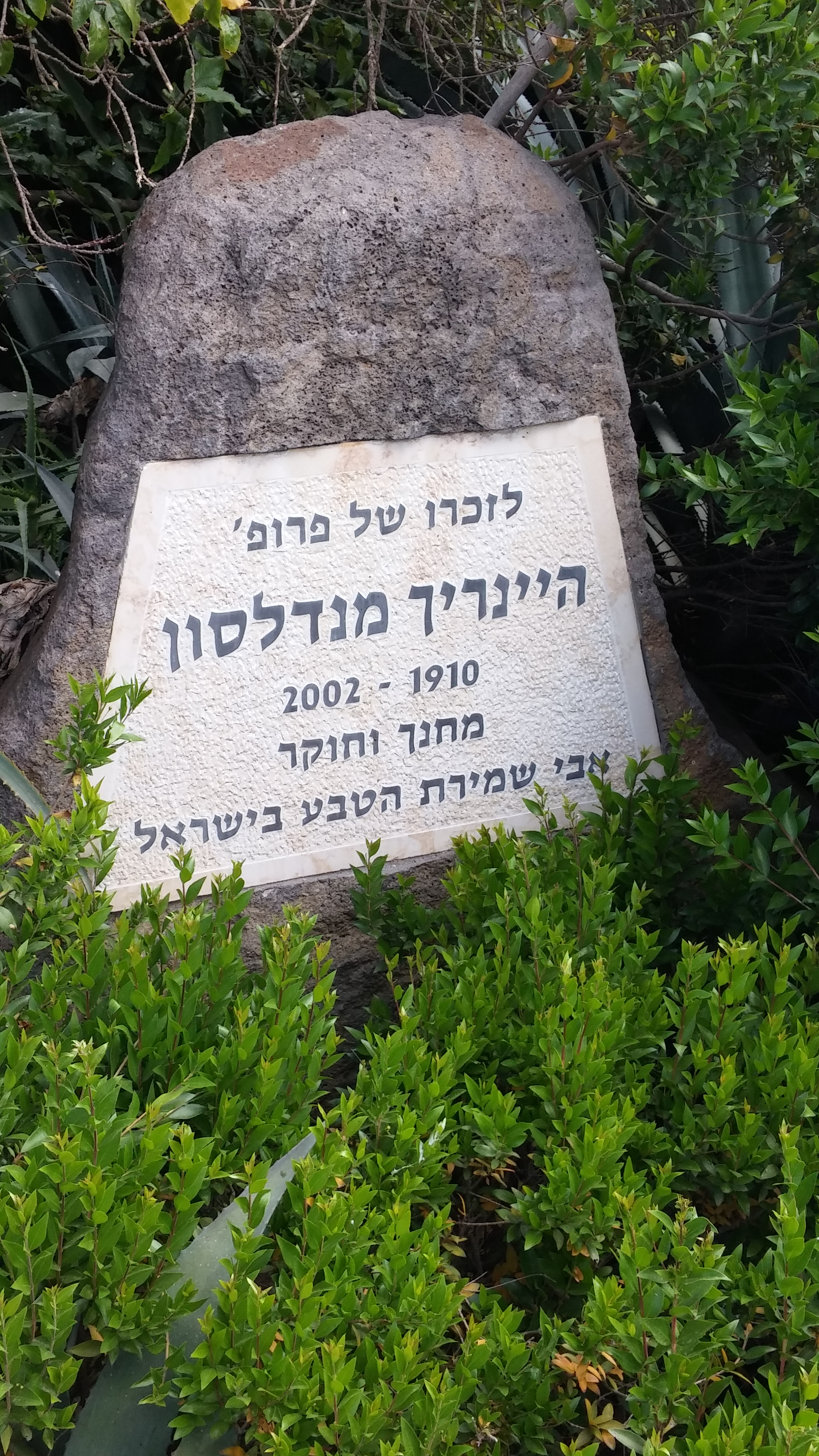 היינריך מנדלסון יד לזכרו הגן הזואולוגי אוניברסטת תל אביב